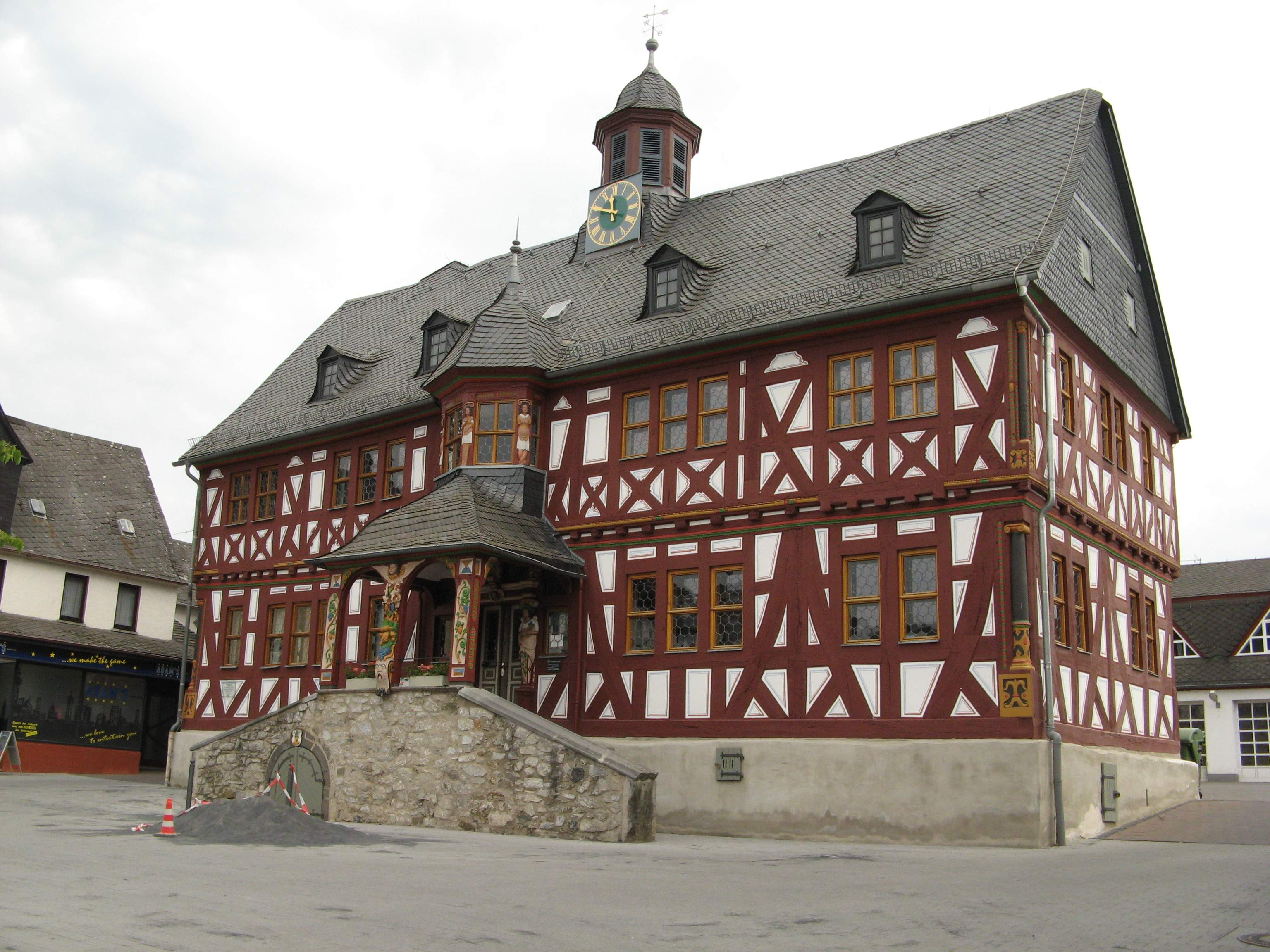 Rathaus in Hadamar, erbaut 1639, (Eingangslaube von 1643)